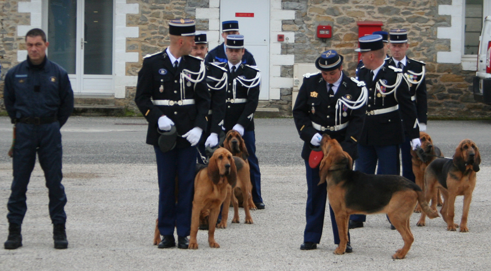 10 chiens de Saint Hubert operationnels en France